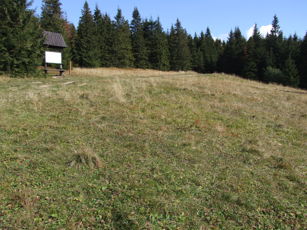 Polana Gaborowska Duża (Gorce)